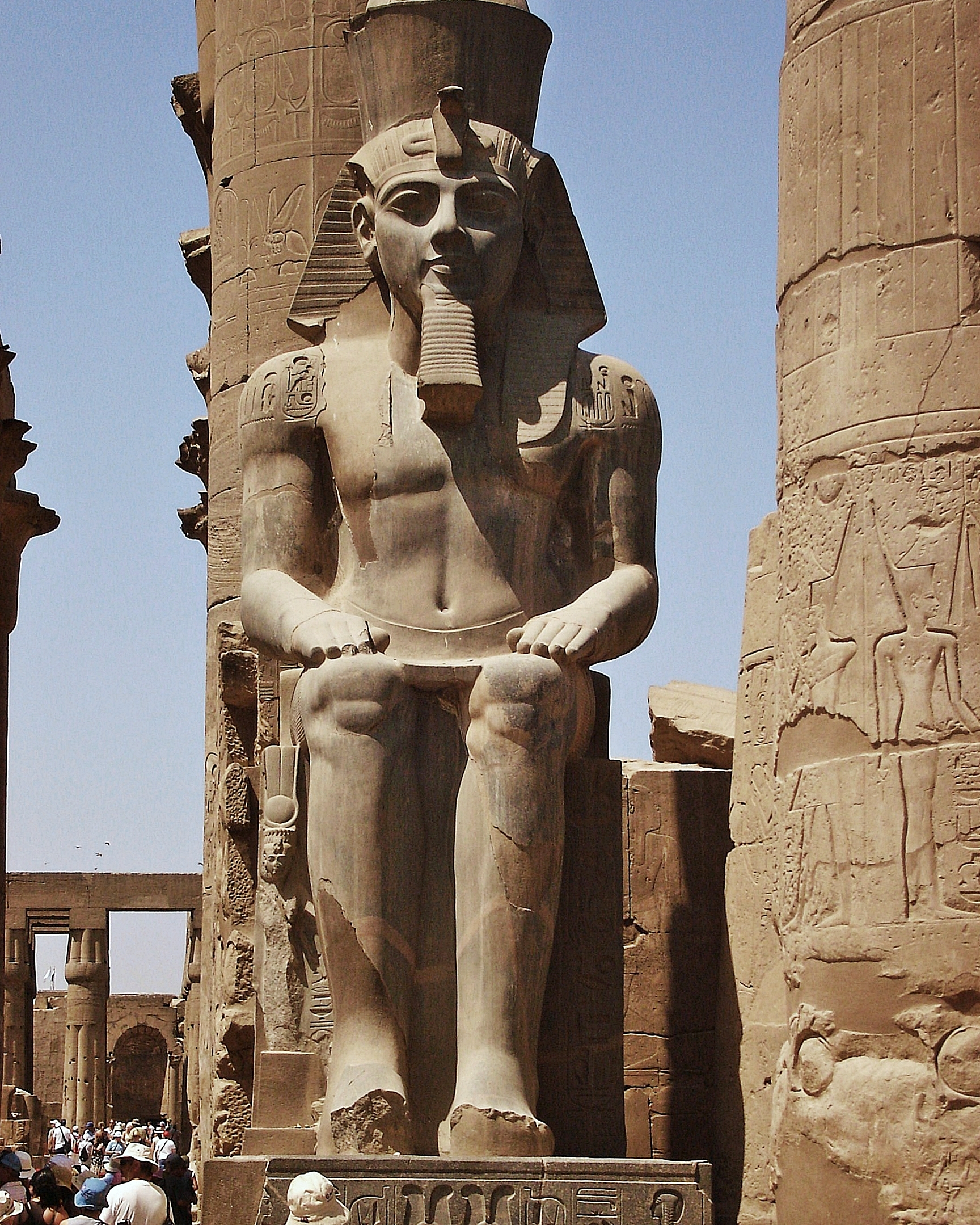 egipto